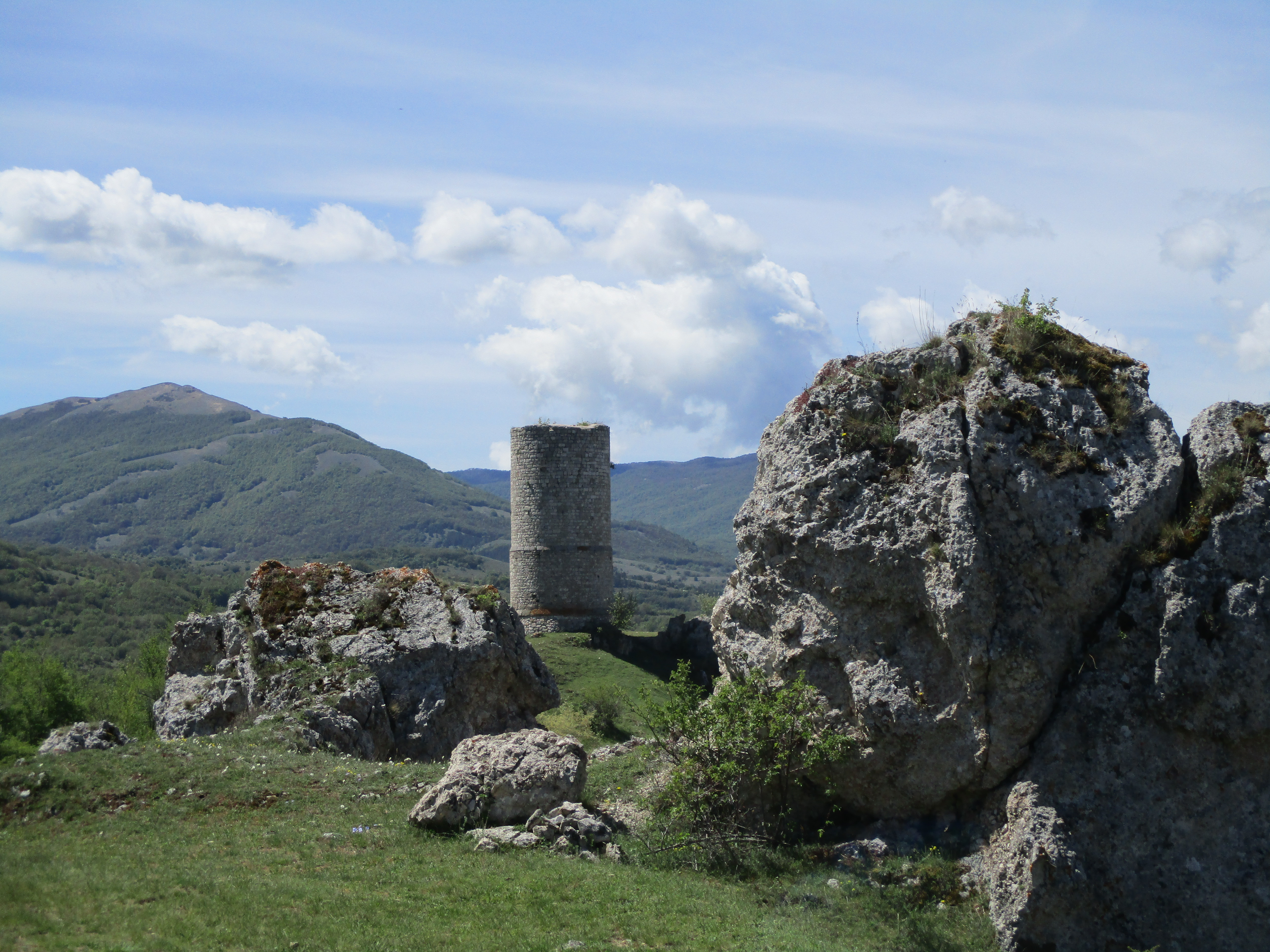 La torre di Sperone